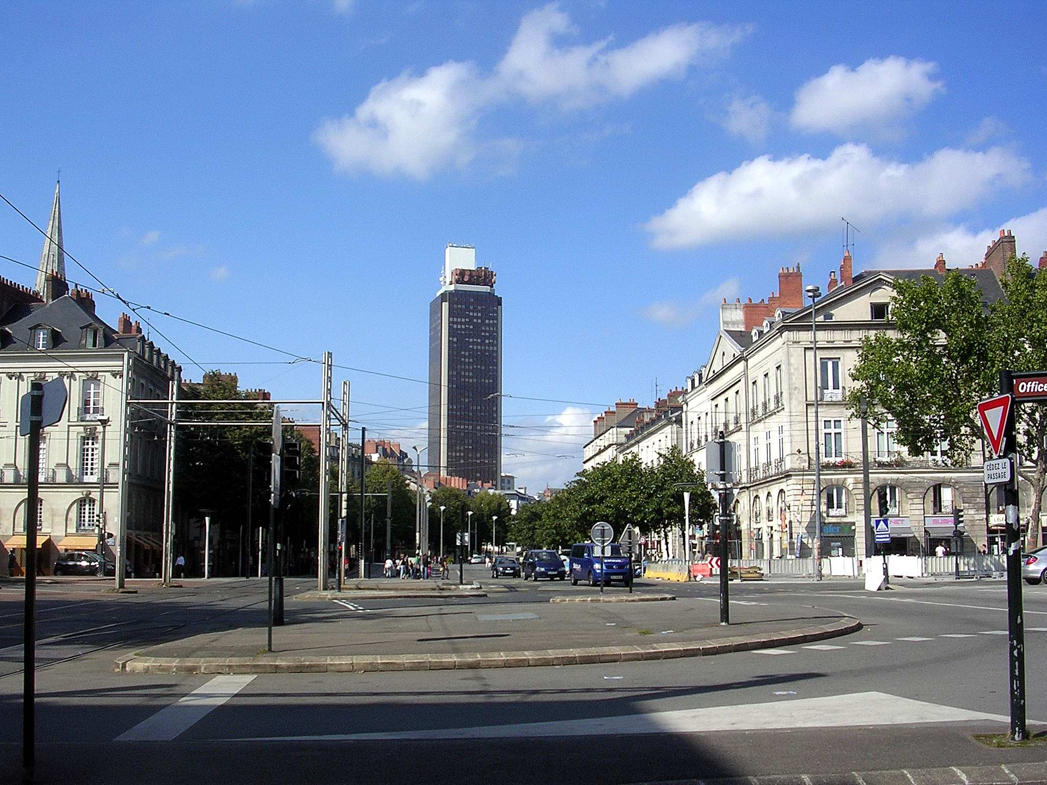 Cours des Cinquante Otages, à Nantes